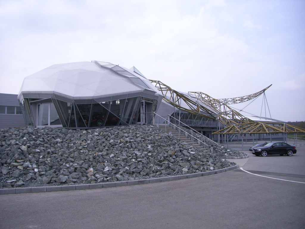 Wiesmann-Auto Sport, Produktions- und Präsentationsgebäude in Gecko-Form, Dülmen, NRW, Germany